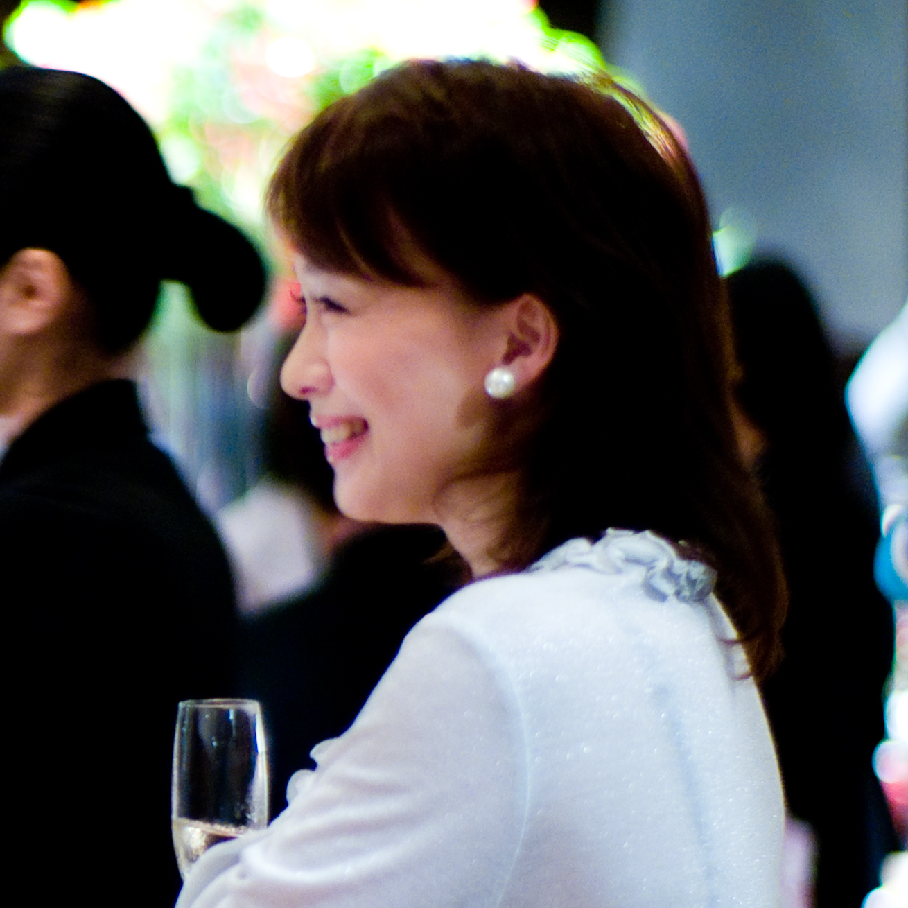 Rie Yasumi